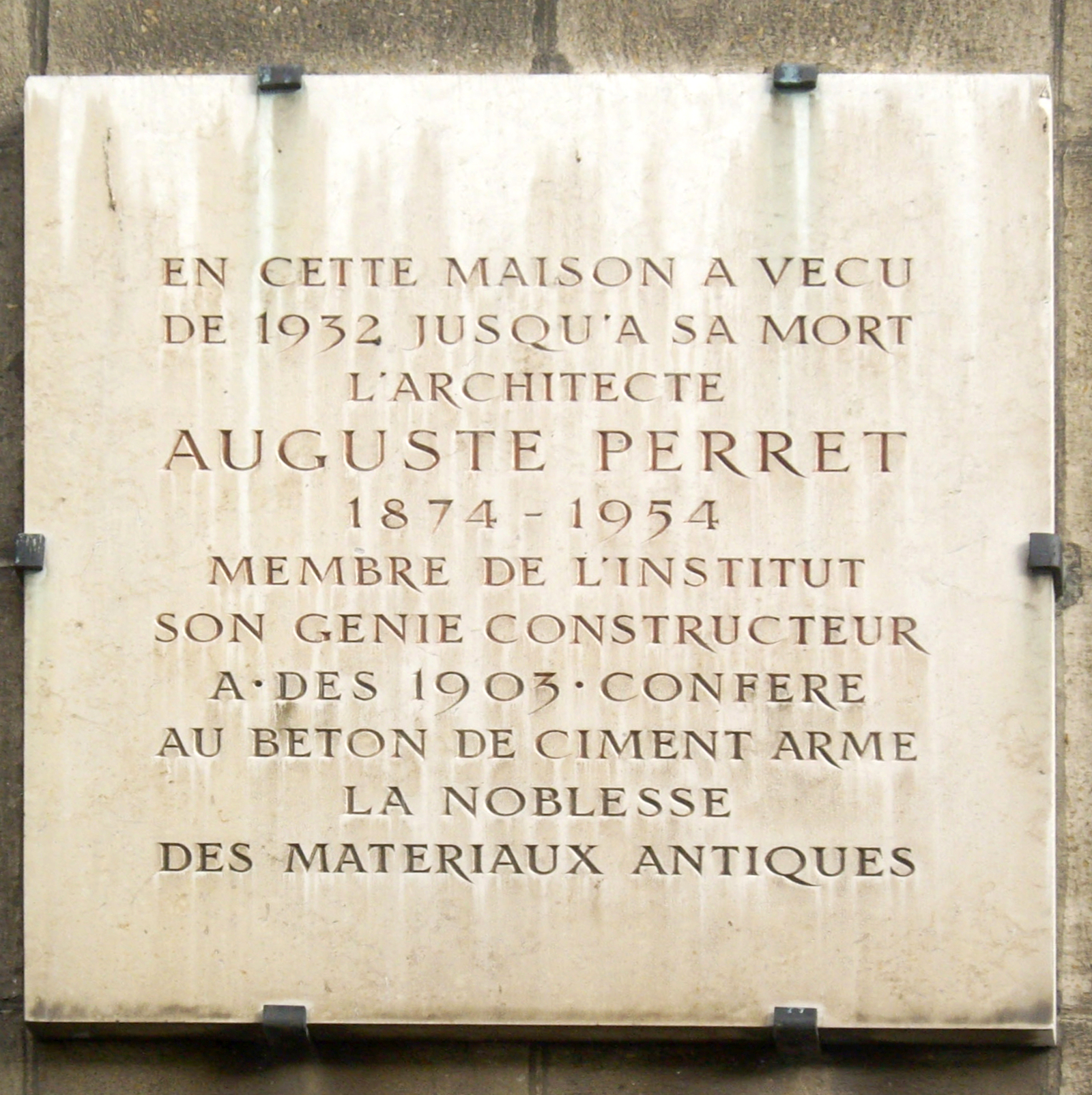 Plaque commémorative, 51-55 rue Raynouard, Paris 16e. « En cette maison a vécu, de 1932 jusqu'à sa mort, l'architecte Auguste Perret, 1874-1954, membre de l'Institut. Son génie constructeur a, dès 1903, conféré au béton de ciment armé la noblesse des matériaux antiques. »